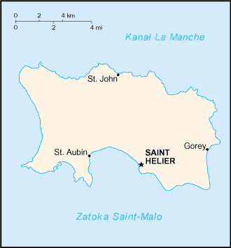 Mapa Jersey, CIA World Factbook